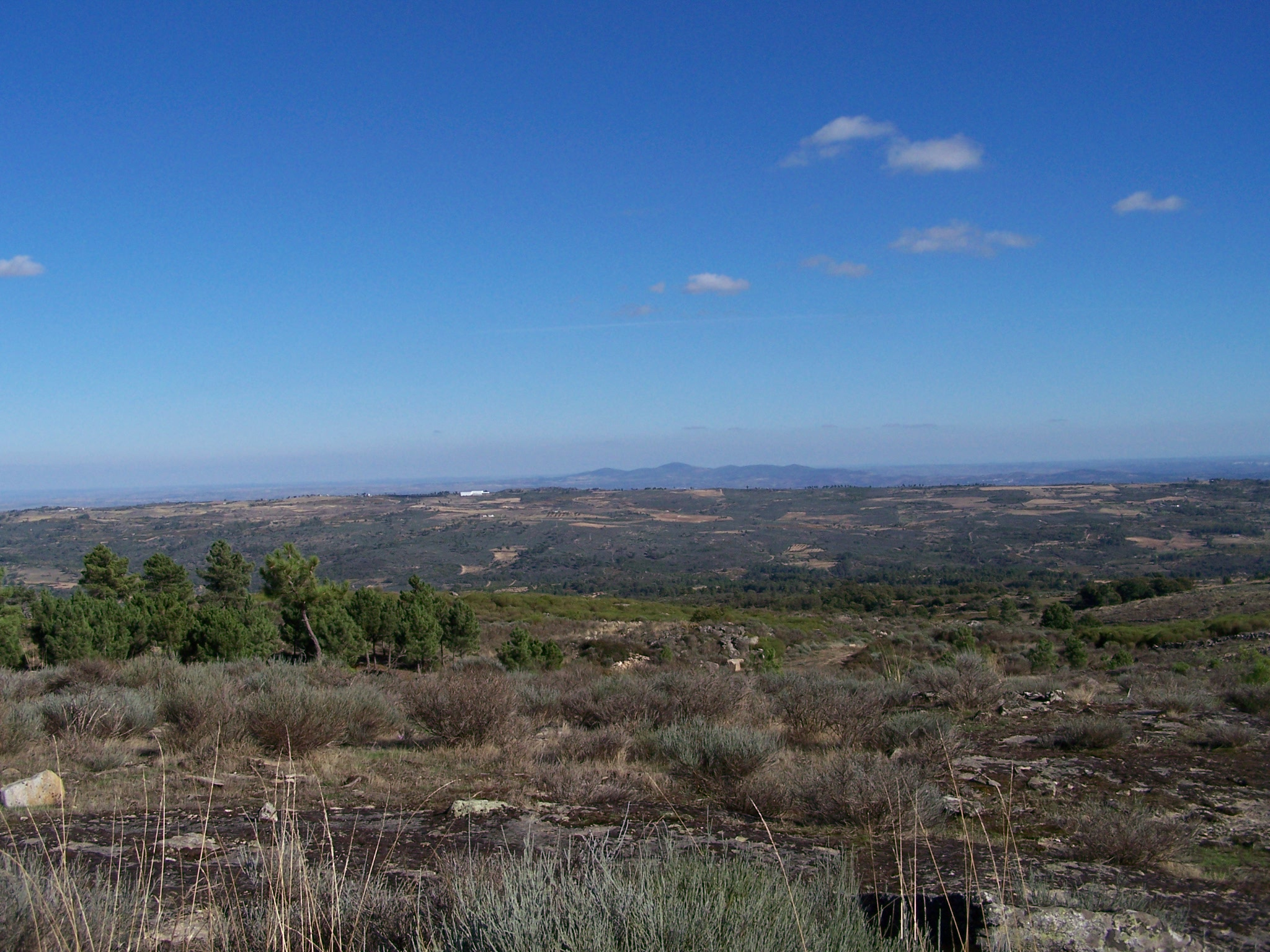 Necrópole megalítica Lameira de Cima, freguesia de Antas, Penedono, Portugal. Paisagem envolvente.